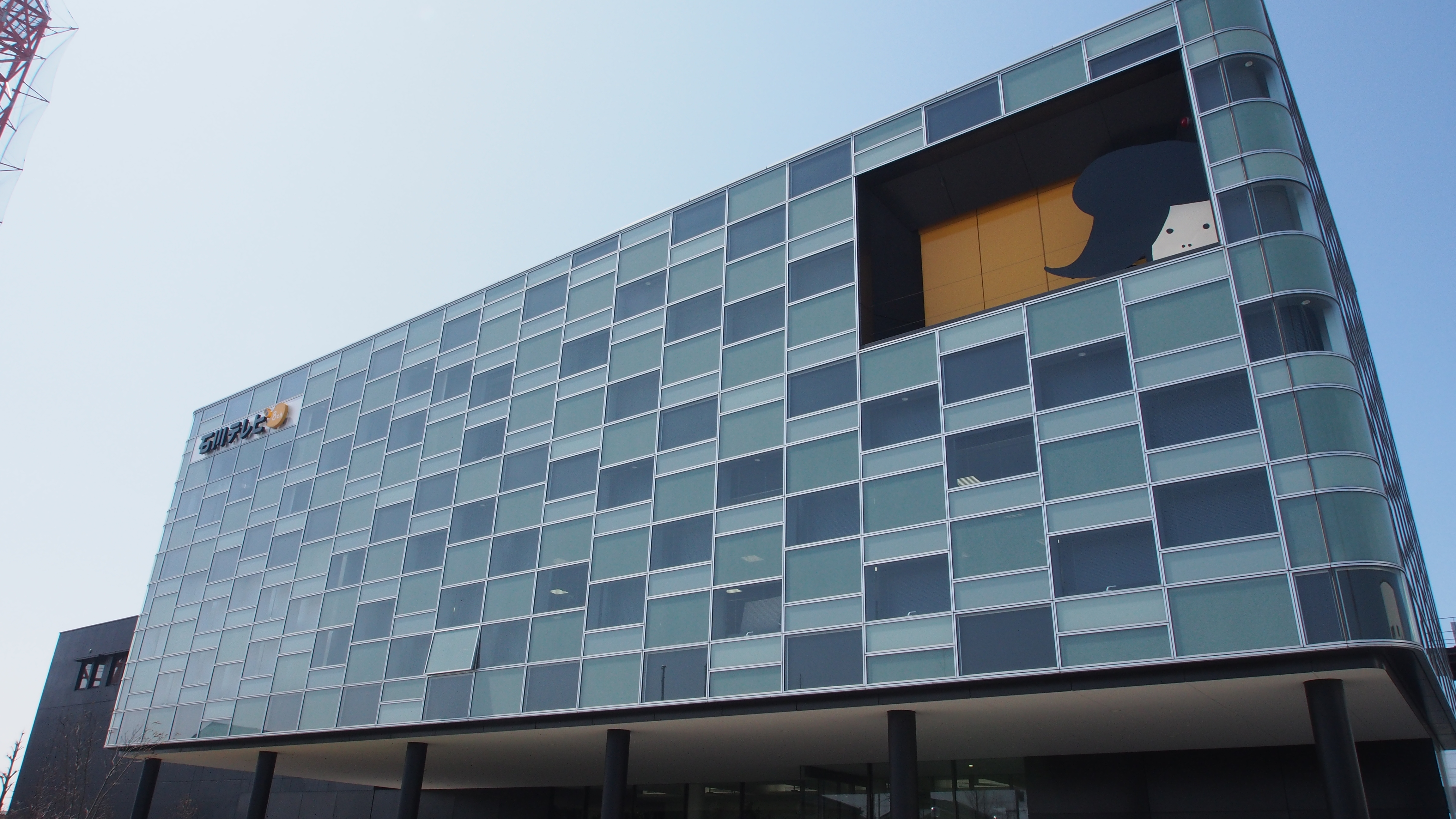 改装後の石川テレビ現社屋